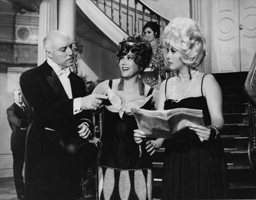 Los actores Maurice Jouvet, Elena Lucena y Libertad Leblanc, en la película La casa de Madame Lulú (1968).